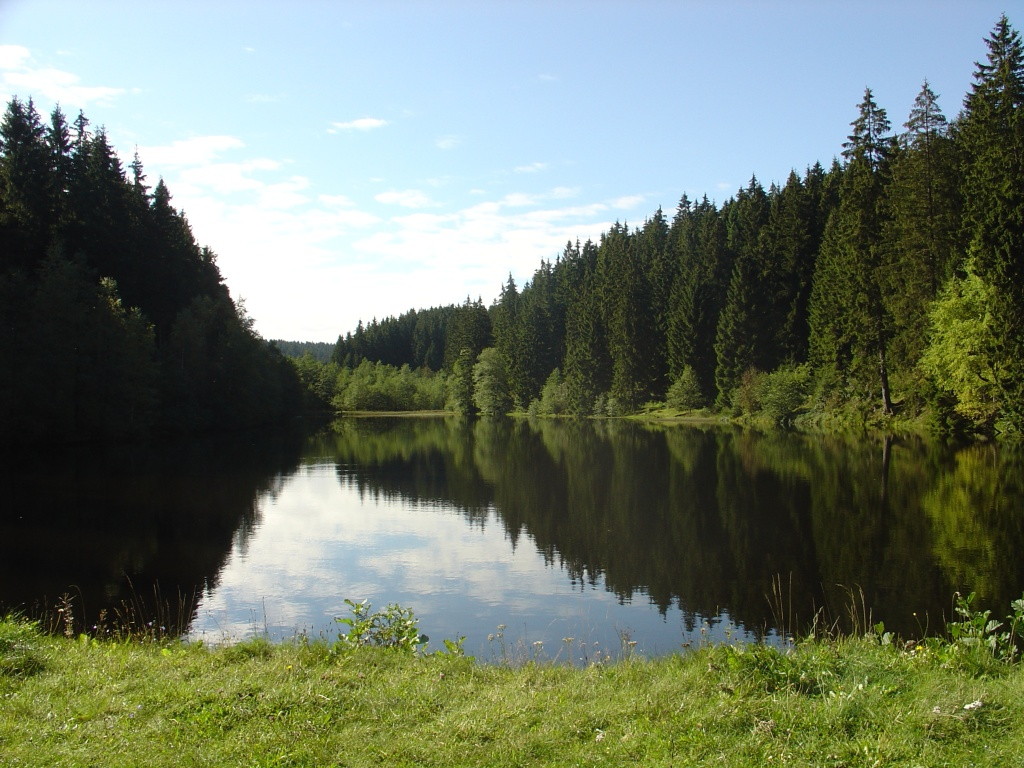 Beschreibung: Hüttenteich bei Altenau *Quelle: selbst fotografiert, Oktober 2004 *Fotograf oder Zeichner: Silberchen 21:36, 13. Apr 2005 (CEST) 22:38, 19. Mär 2005 Silberchen 1024 x 768 (311.008 Byte) (Hüttenteich bei Altenau)